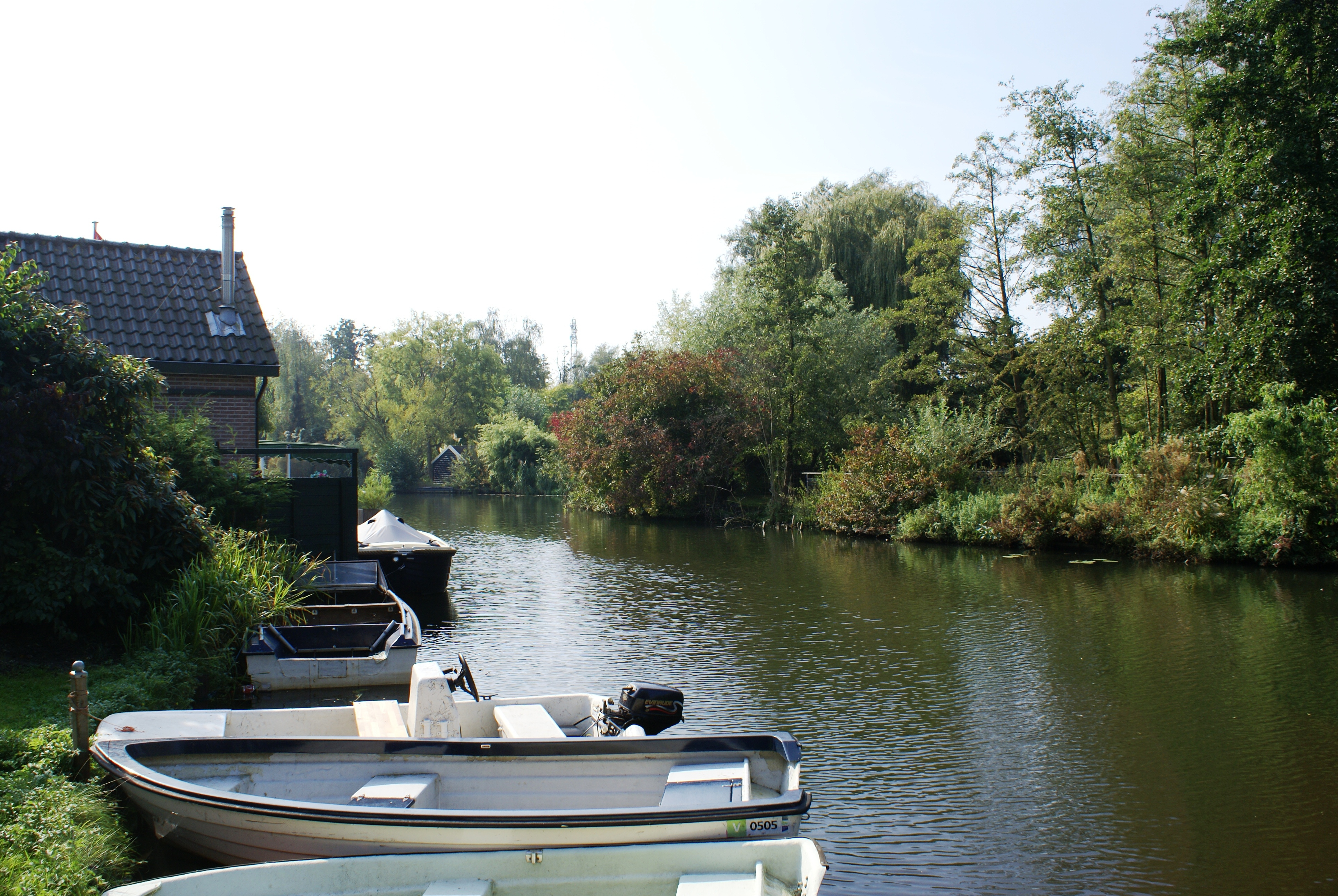 Waaltje in Hendrik Ido Ambacht